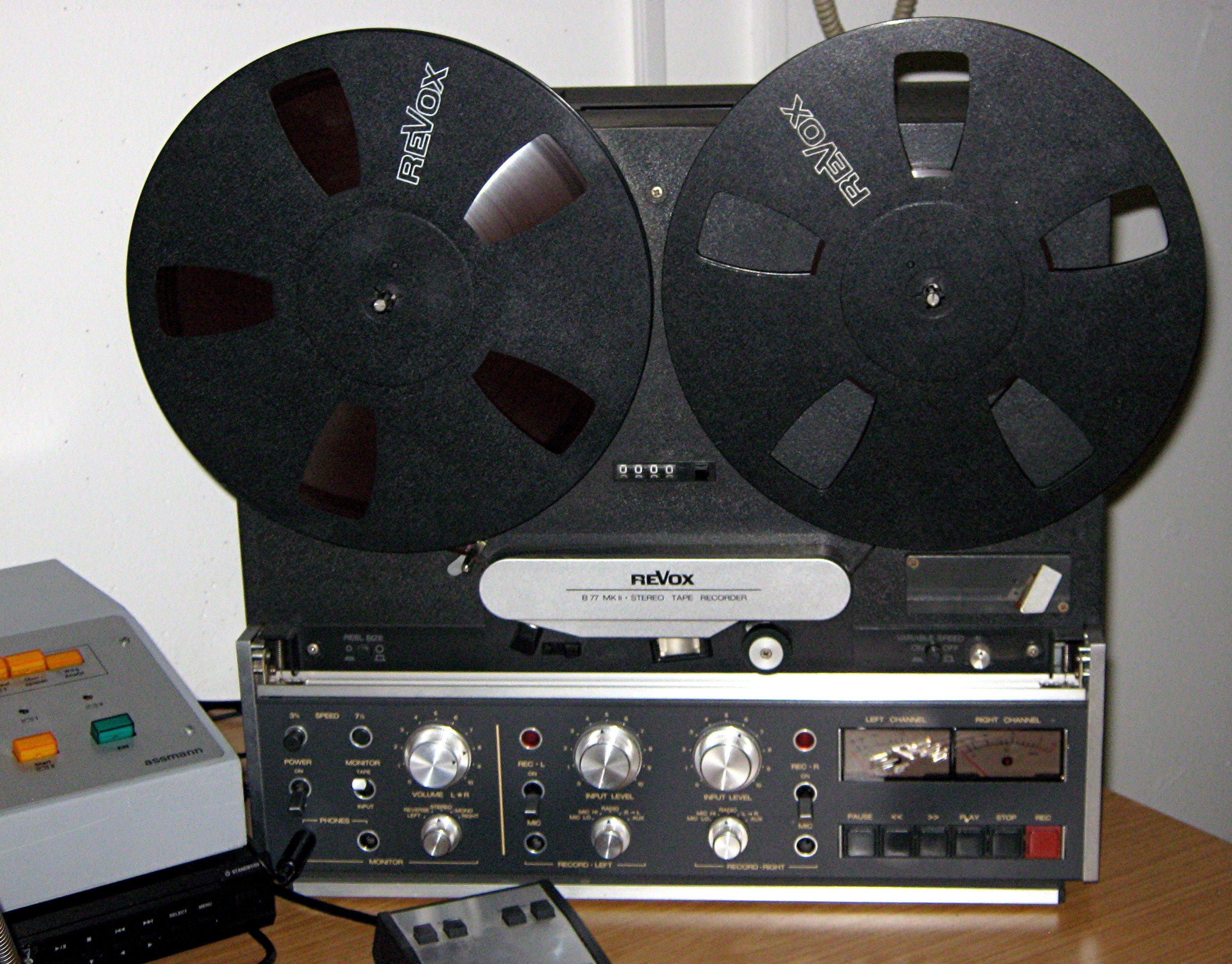 Revox B77 Mk II (Baujahr ungefähr Mitte der 1980er Jahre) im Fernmeldemuseum Aachen, weil das Tonbandgerät für die Aufzeichnung von Ansagen (Kinoprogramm, Wetter, usw.) genutzt wurde